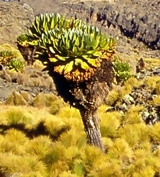 Dendrosenecio keniodendron (Syn. Senecio keniodendron) on Mount Kenya